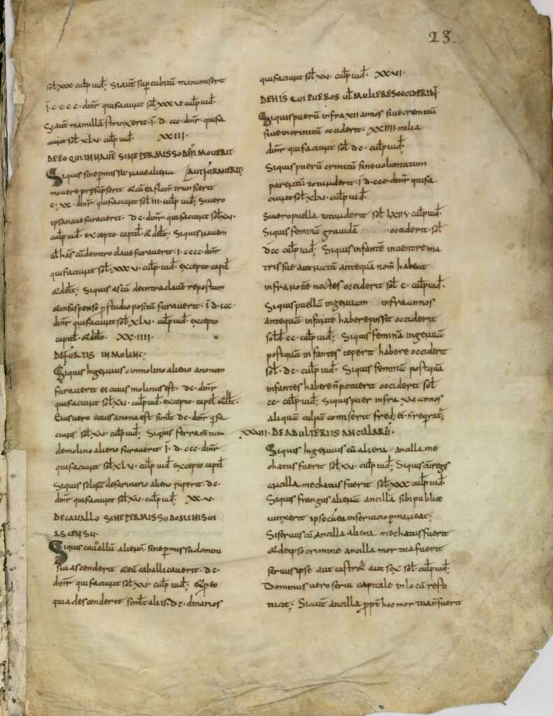 Lex Salica